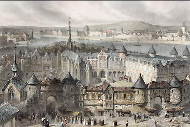 Palais De Justice et Ste Chapelle, Au XIVème Siècle Paris. Gravure sur acier, gravée par J. Outhwaite nach K. Girardet. 1852. Très bon état. Aquarellée à la main.